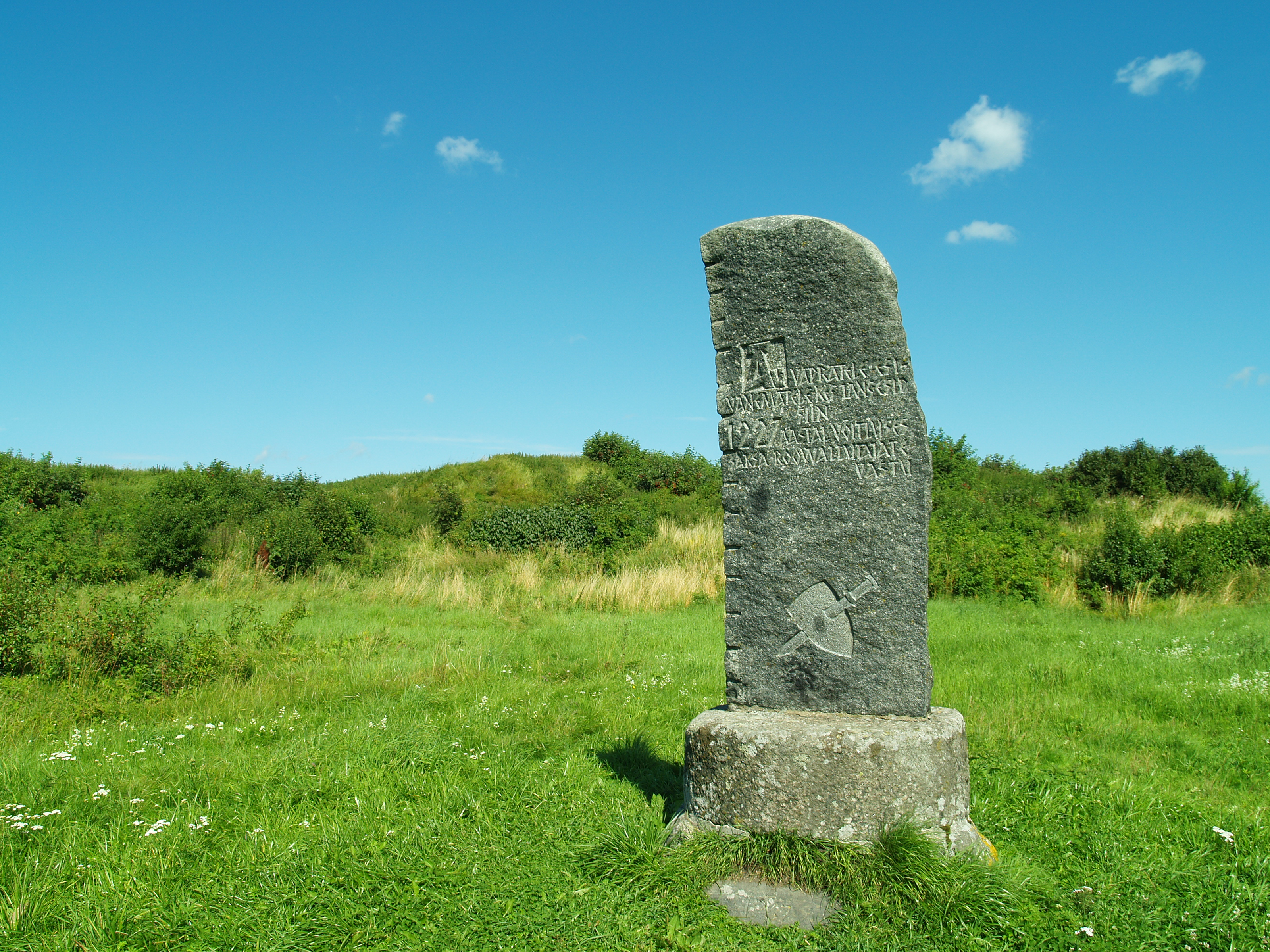 Muhu maalinn, mälestuskivi.